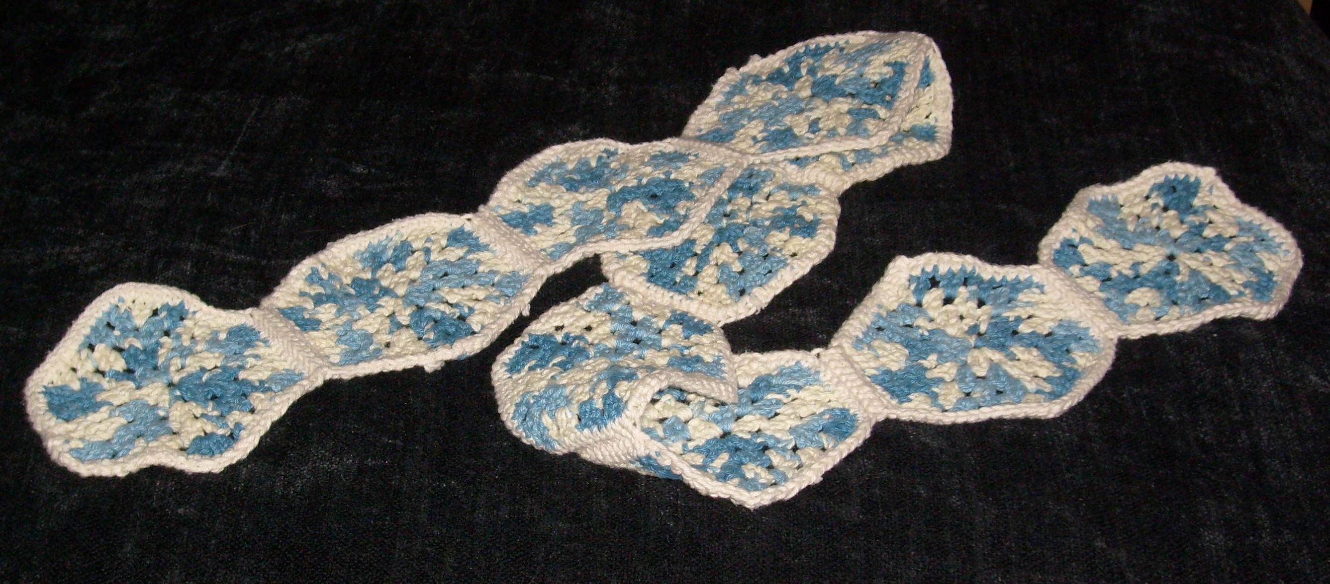 Scarf. Crochet: hexagonal granny square variation, cotton. Original design